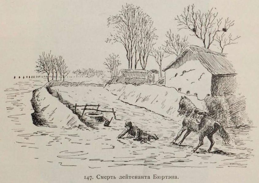 La mort du lieutenant Marie Pierre Augustin Burtin. 28 Décembre 1904 (10 Janvier 1905), Mandchourie